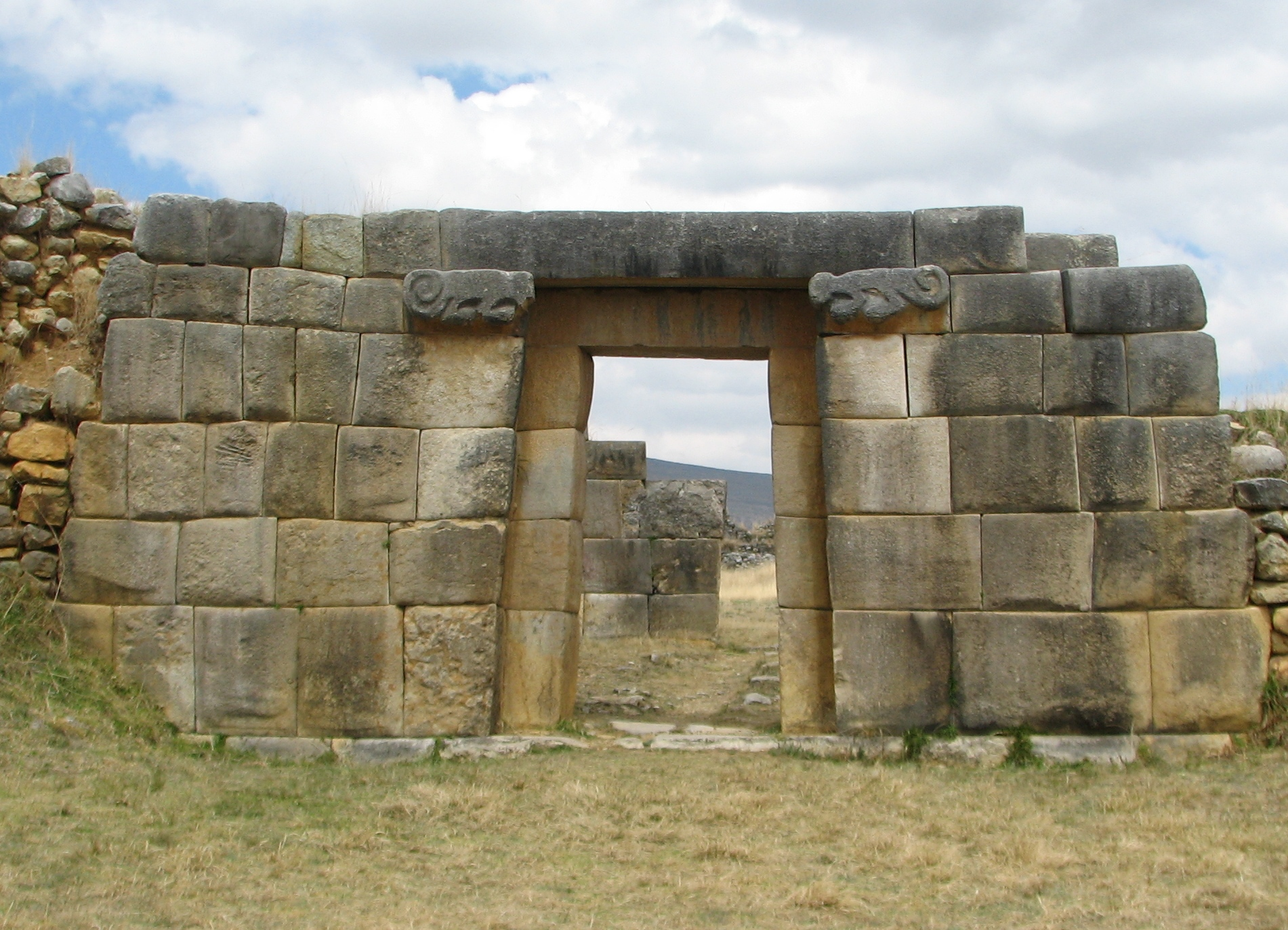 Huánuco Pampa Archaeological site (doorway)